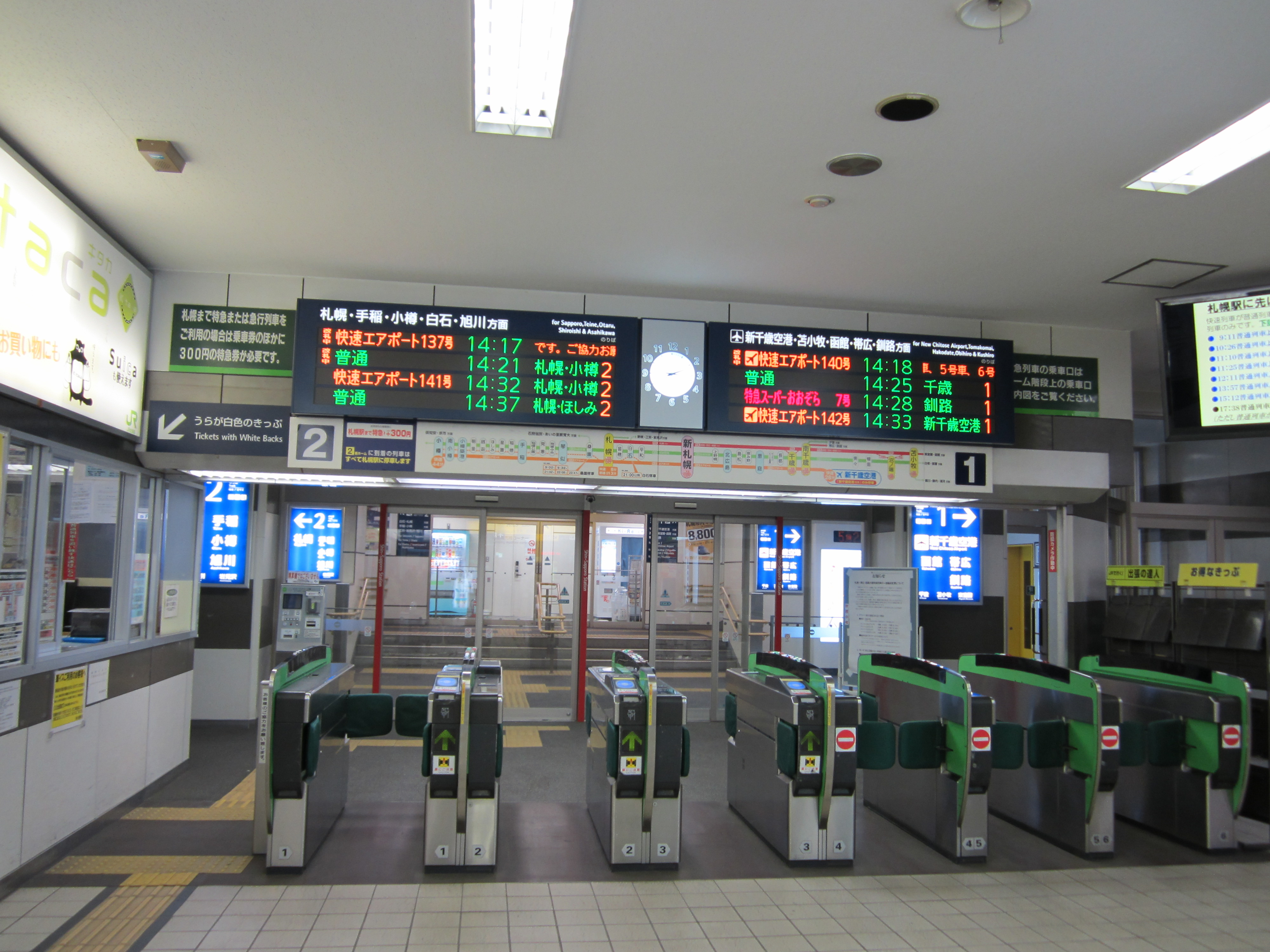 JR北海道新札幌駅改札口（2012年5月）